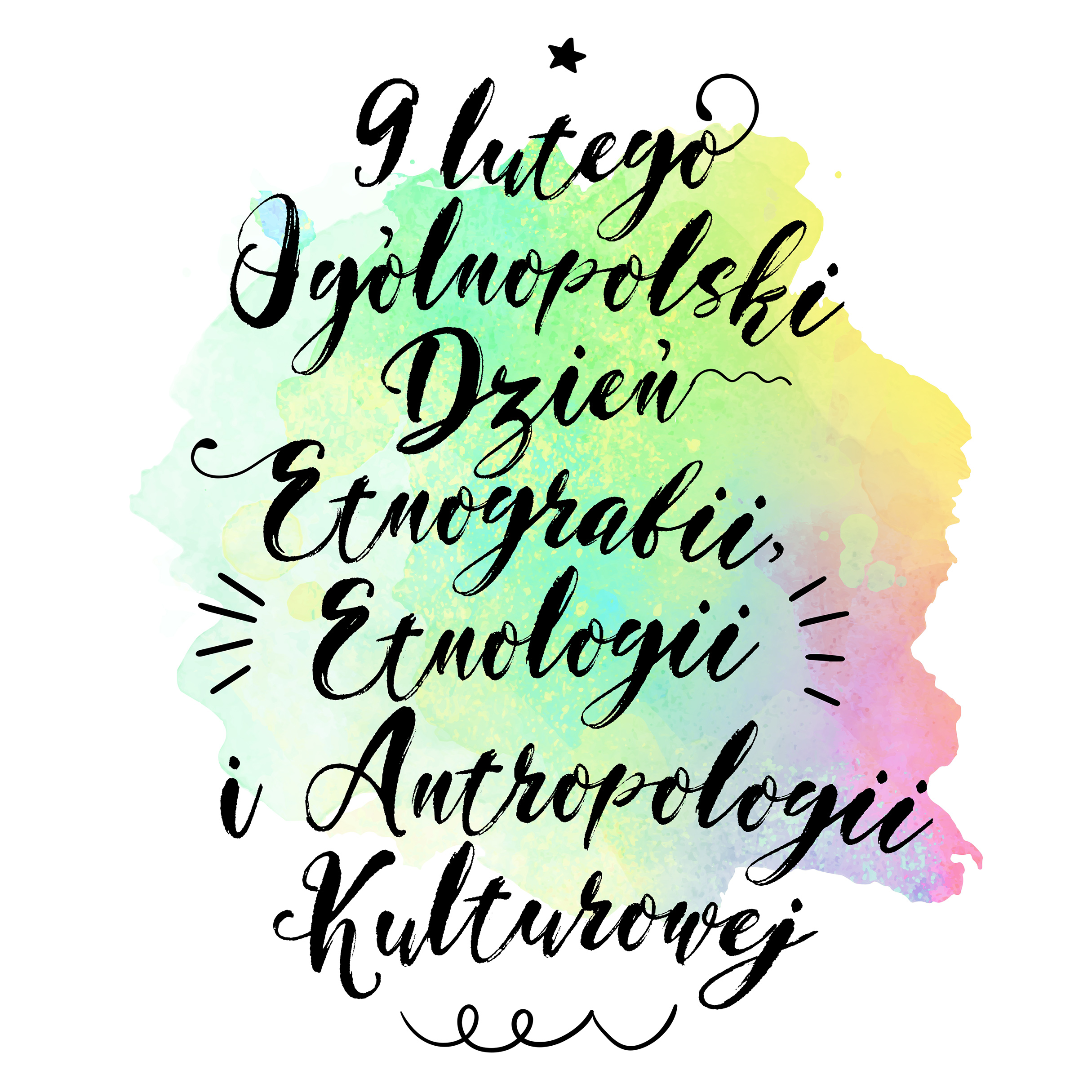 Logotyp wydarzenia 9 lutego - Ogólnopolski Dzień Etnografii, Etnologii i Antropologii Kulturowej